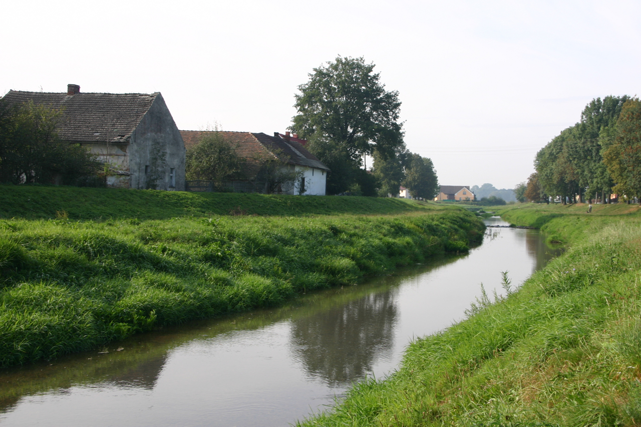 Kierpień (dodatkowa nazwa w j. niem. Kerpen) – wieś w Polsce położona w województwie opolskim, w w powiecie prudnickim, w gminie Głogówek.